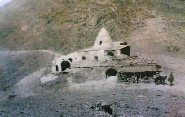 امامزاده هاشم 1273 خورشیدی